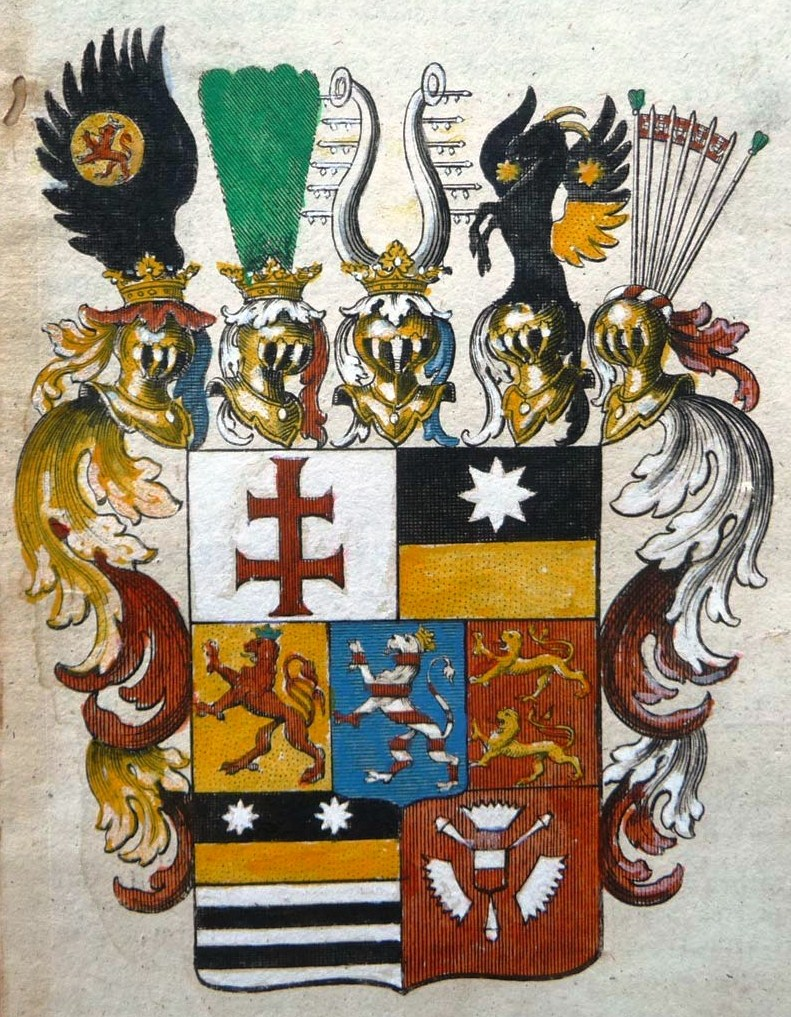 Land-Gräffl. Hessen Darmstädtisches Wappen: Wappen (1642-1736) der Landgrafschaft Hessen-Darmstadt